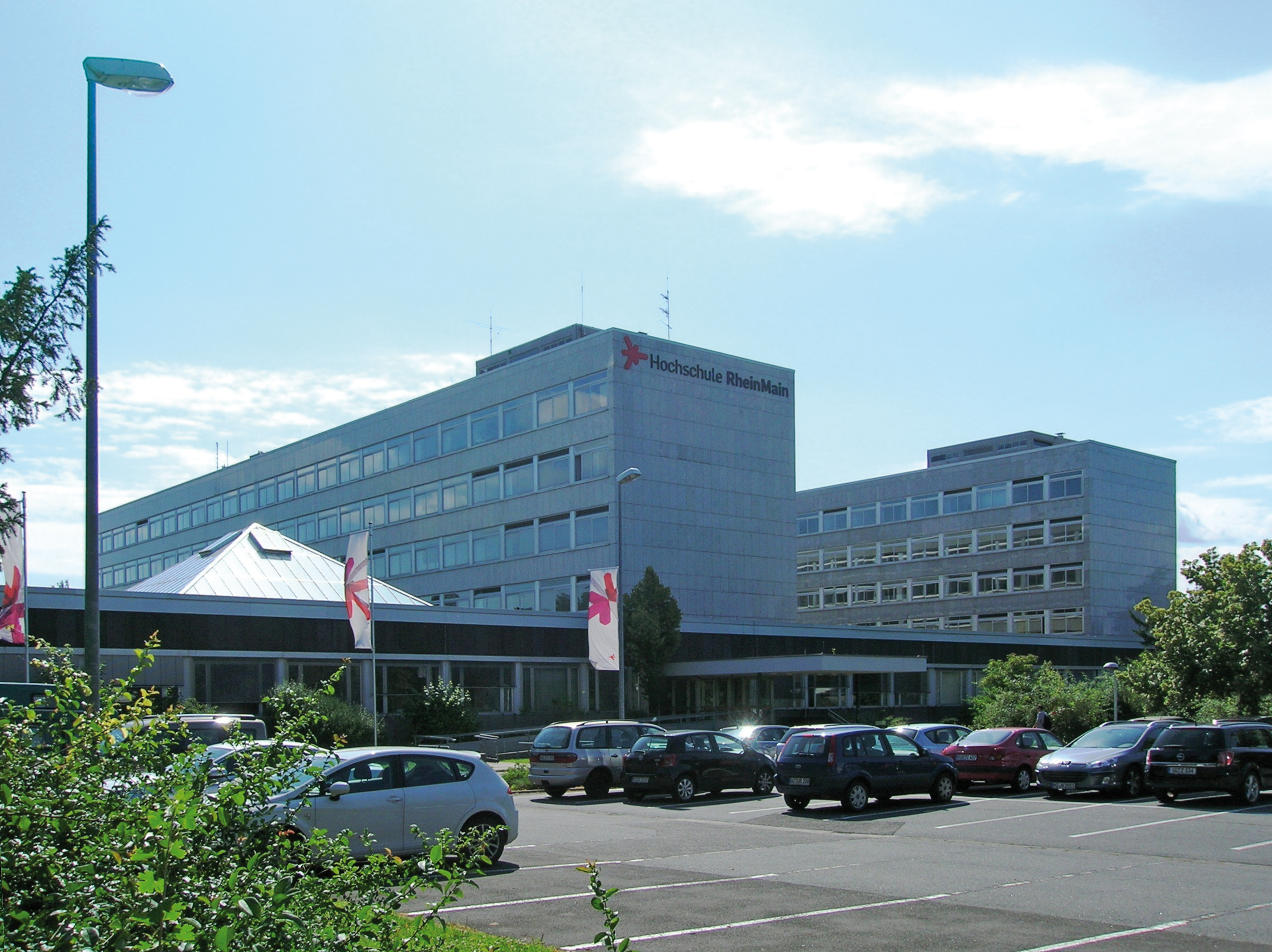 Hochschule RheinMain Rüsselsheim Haupteingang